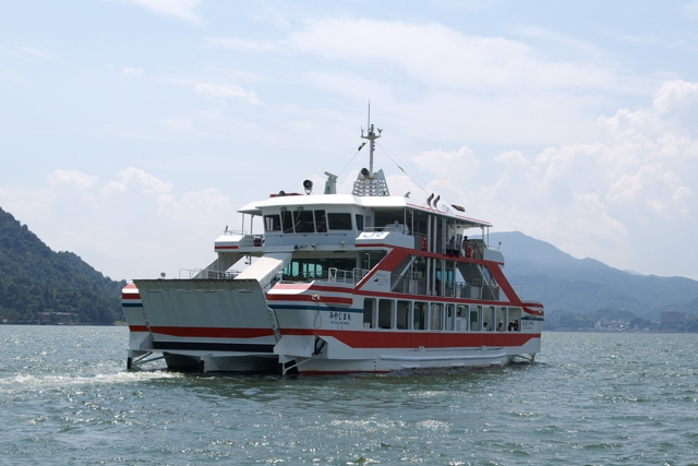 撮影者自身によるアップロード 2006年7月30日宮島桟橋において撮影 JR宮島航路に2006年就航の新みやじま丸